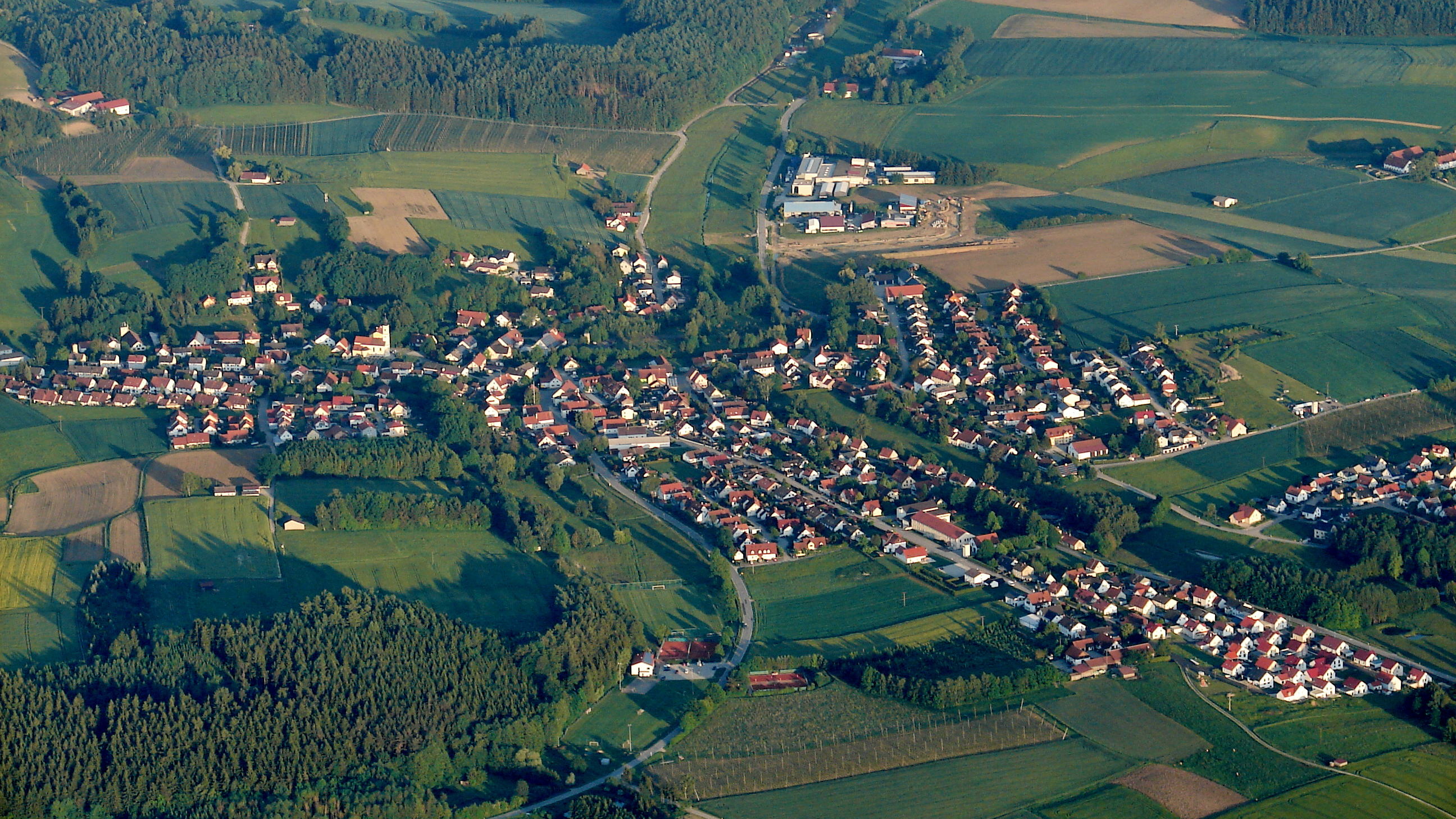 Hörgertshausen ist eine Gemeinde im oberbayerischen Landkreis Freising und ein Mitglied der Verwaltungsgemeinschaft Mauern.